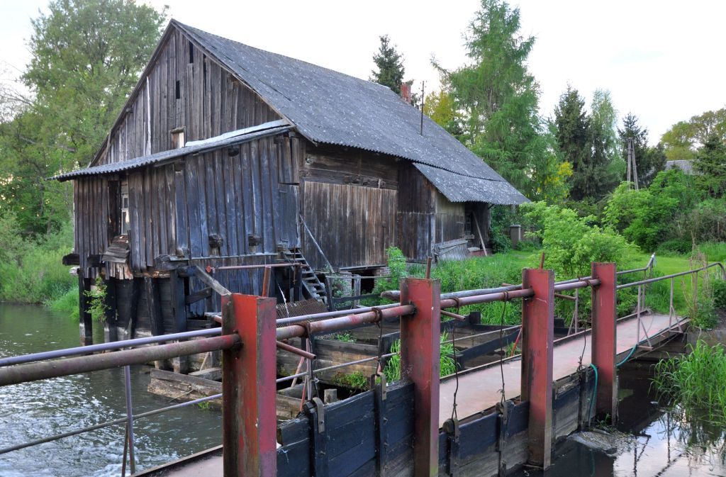 Młyn Papiernia, widok w 2014 r.